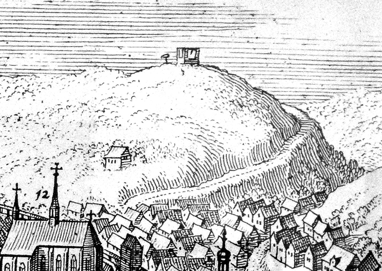 Hochgericht mit dreisäuligem Galgen auf dem Galgenberg oberhalb von Eichstätt 1627. Ausschnitt aus der Stadtansicht von Matthäus Merian. (Ausschnitt aus einer Fotografie eines Reprints in der Willibaldsburg)